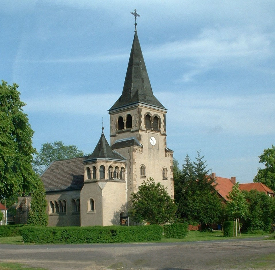 1890 errichtete Kirche zu Kerzendorf